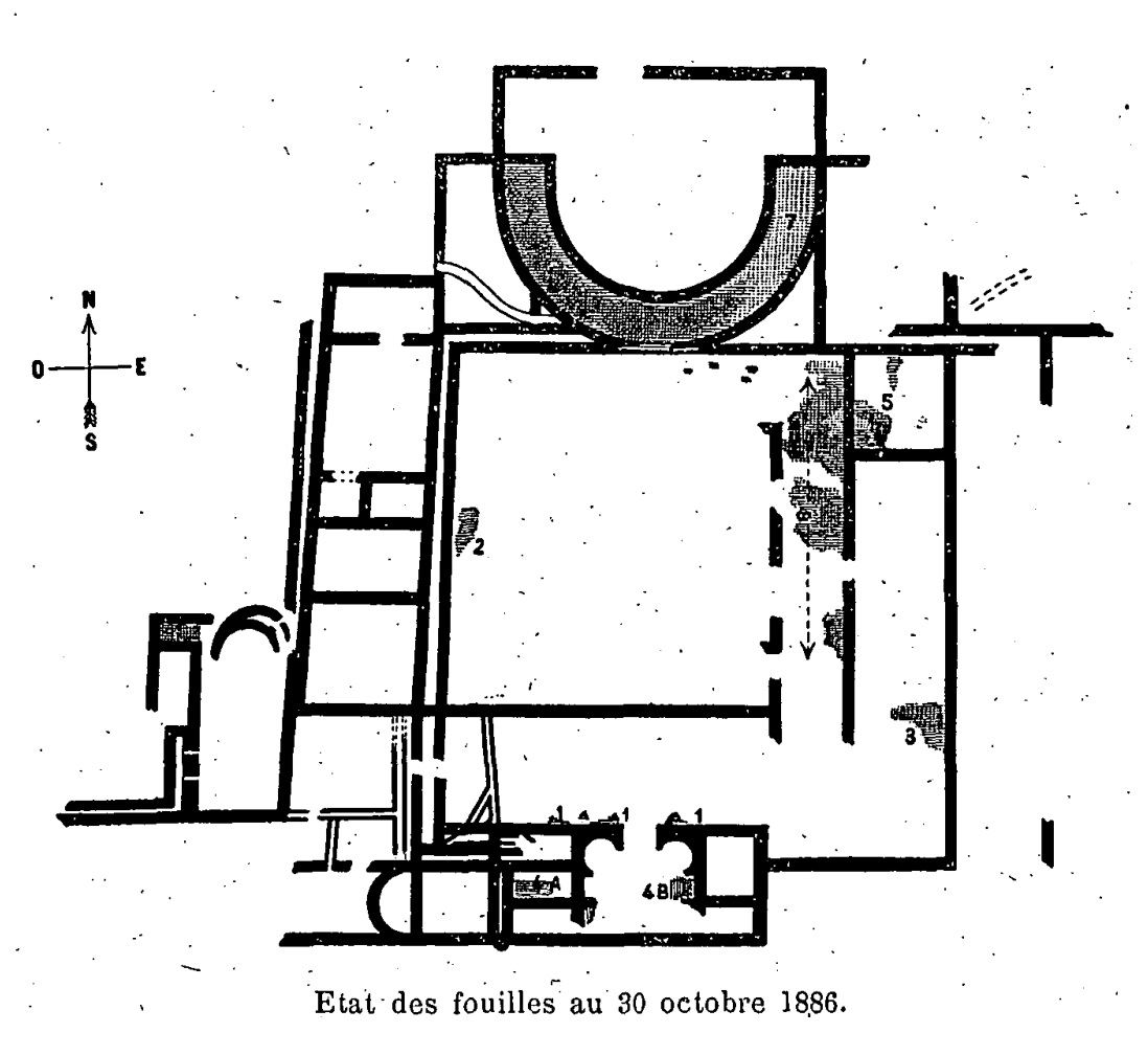 Plan de la villa Sent-Miqueu à Lescar